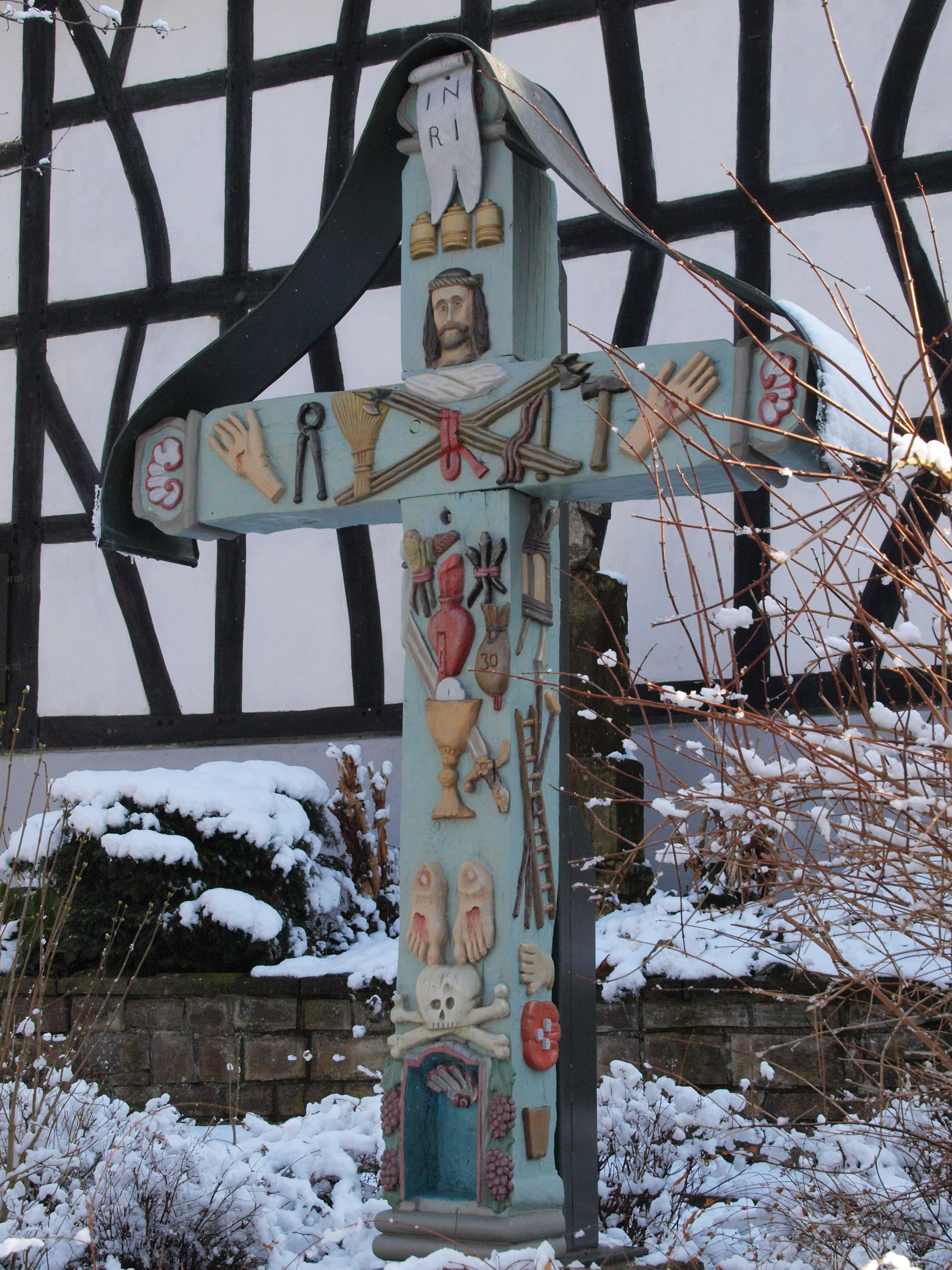 Denkmalgeschütztes Wegekreuz, Siegstraße (vor Nr. 11, nahe Ecke Kreuzstraße), Weldergoven, Stadt Hennef (Sieg)